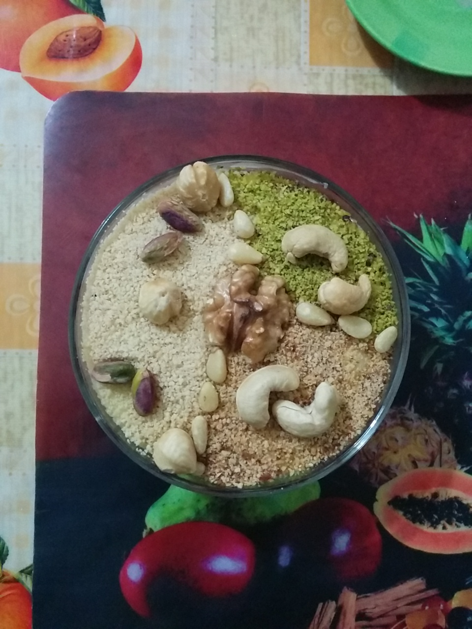 Coupe d'assidat zgougou décorée de fruits secs This is an image of food from Tunisia